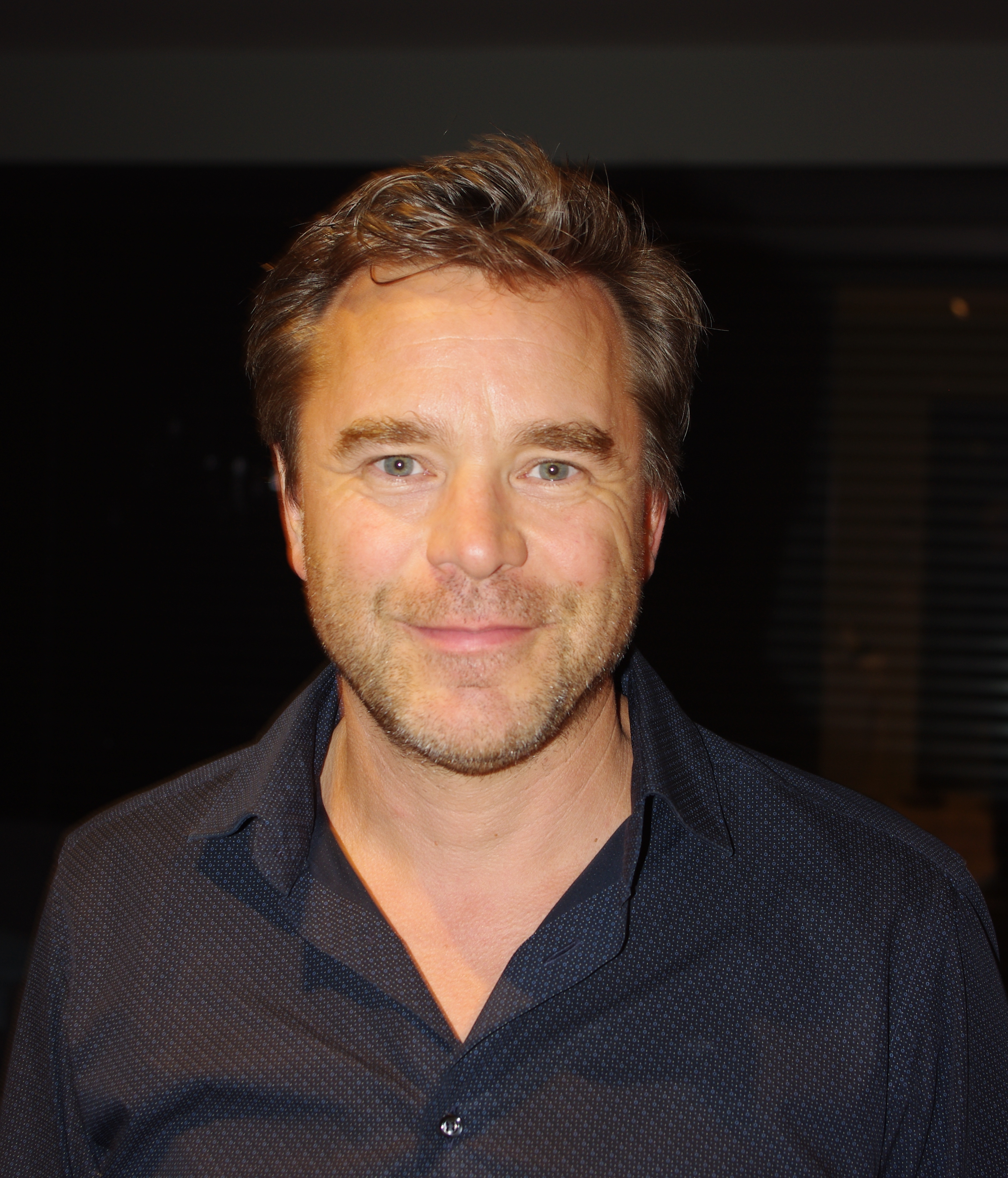 Photographie de Guillaume de Tonquédec (juin 2017)